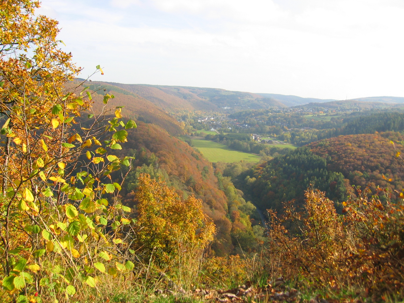 Gemünd im Tal der Urft im Herbst 2013